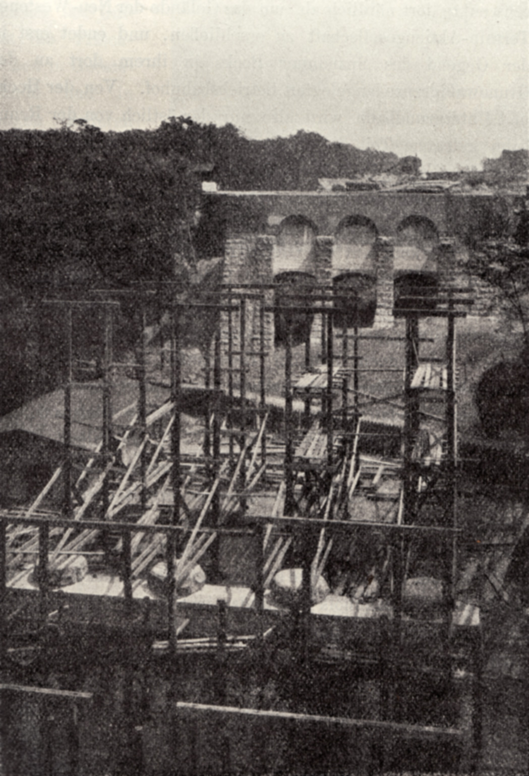 Berlin - Stössenseebrücke, Bauarbeiten Landpfeiler